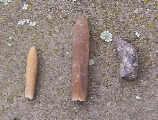 Belemniten (Donnerkeile) aus dem Ölbach in Ahaus-Wüllen, Kreis Borken, NRW, Germany.